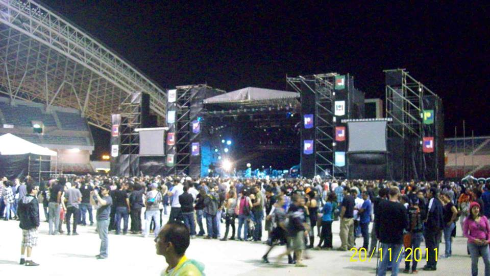 Pearl Jam en 2011